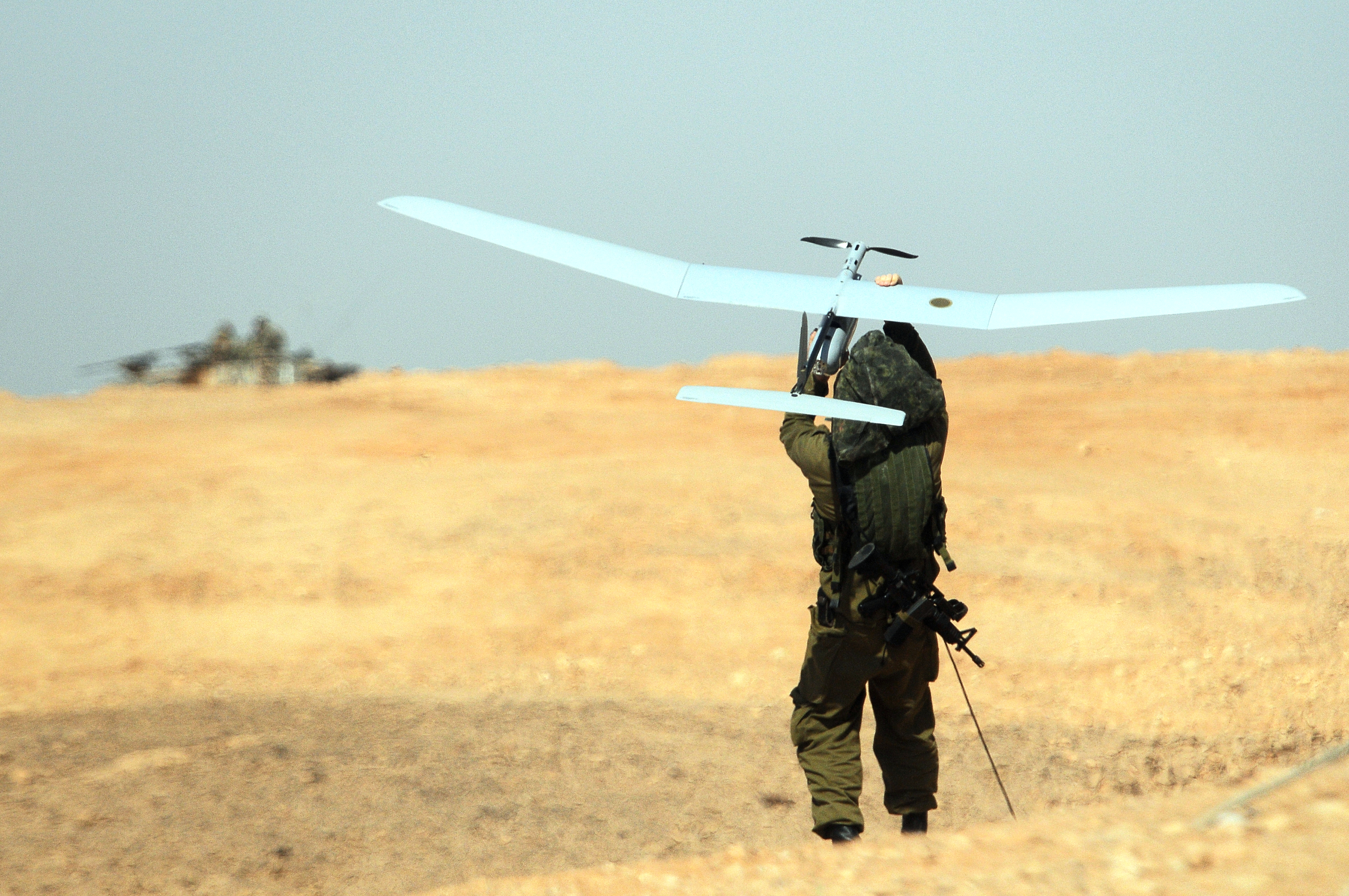 February 02, 2010. A large-scale Ground Forces military exercise which combined multiple corps was concluded this Tuesday, in attendance of the Chief of the General Staff, Lt. Gen. Gabi Ashkenazi, and the Commander of the Ground Forces, Maj. Gen. Shlomo (Sami) Turjeman. The exercise combined forces from the Armor, Infantry, Artillery, Combat Engineering, and Field Intelligence Corps, as well as IAF support in the form of various aircraft. Pictured: Soldier preparing to throw a Skyrider UAV into the air. Featured as "Photo of the Day" on November 22, 2010. Photo by Michael Shvadron, IDF Spokesperon's Film Unit. במעמד ראש המטה הכללי, רא"ל גבי אשכנזי, נערכה היום סדרת קרב משולב של זרוע היבשה בבסיס צה"ל בשיזפון. בתצוגת היכולות המרשימה השתתפו מפקד זרוע היבשה, אלוף סמי תורג'מן וקציני חיל ראשיים מחילות היבשה. באימון השתתפו כוחות מחילות השריון, התותחנים, ההנדסה, האיסוף הקרבי וחיל הרגלים, והן כוחות חיל אוויר לסיוע אווירי, פינוי מוסק והספקה בהיטס. בתמונה: חייל מגדוד "רוכב שמיים" מתכונן להטיס כטב"ם. התמונה פורסמה כ"תמונת היום" בתאריך נובמבר 22, 2010. צולם על ידי מיכאל שבדרון, יחידת ההסרטה, דובר צה"ל.